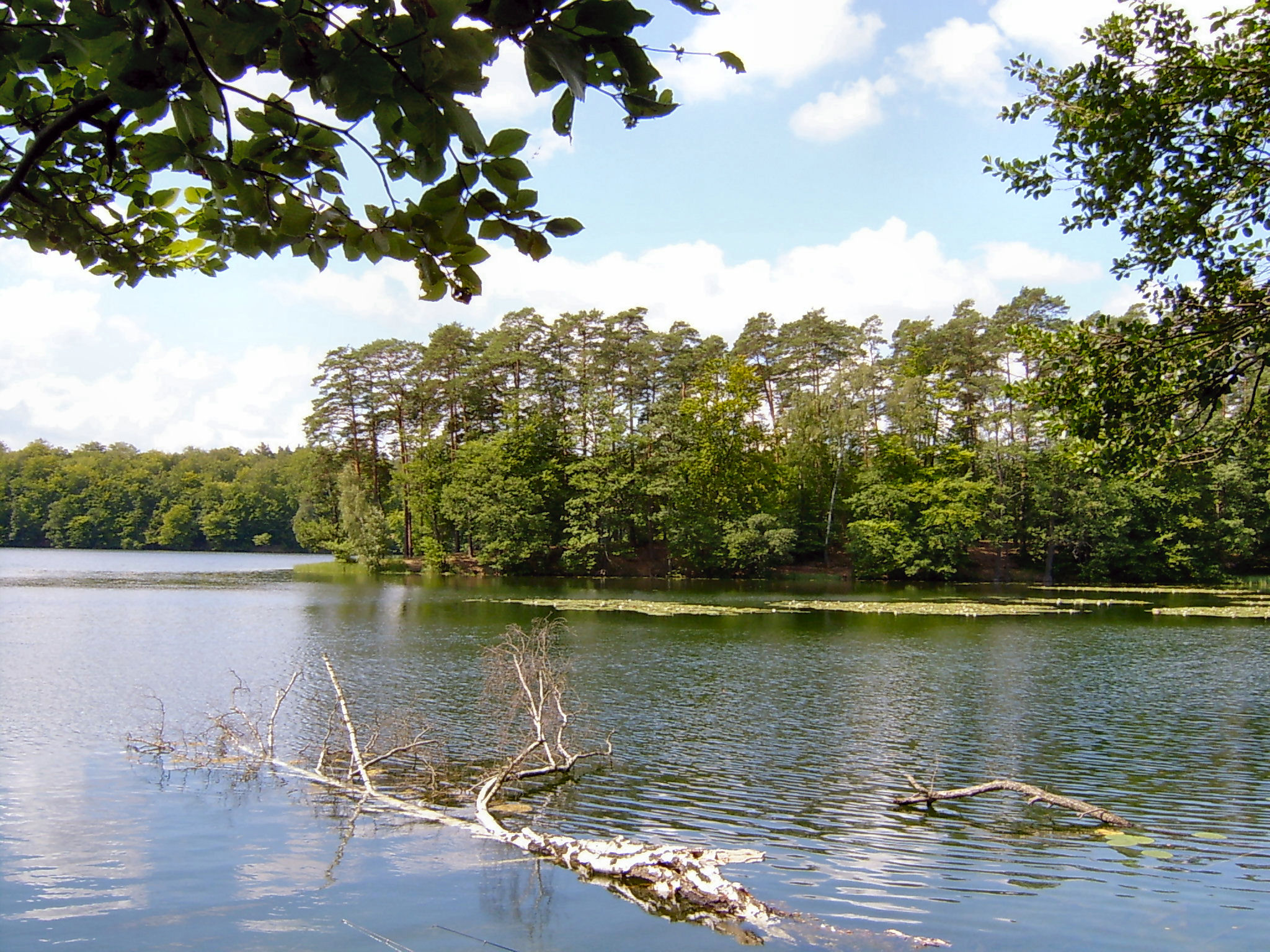 Jeziora Suche z lewej i Lubieszewko z prawej nazywane razem Portkami, obok miejscowości Lipy, gmina Kłodawa, woj. lubuskie, Poland